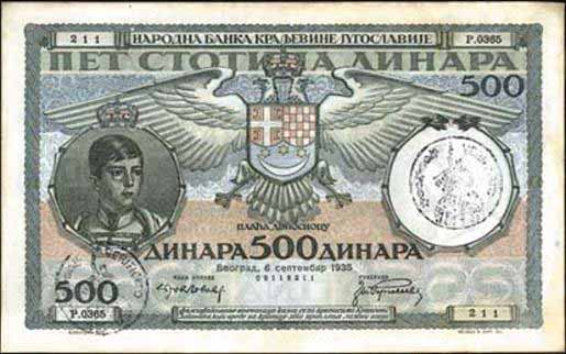 500 Yugoslav dinars note (1929 dinar)